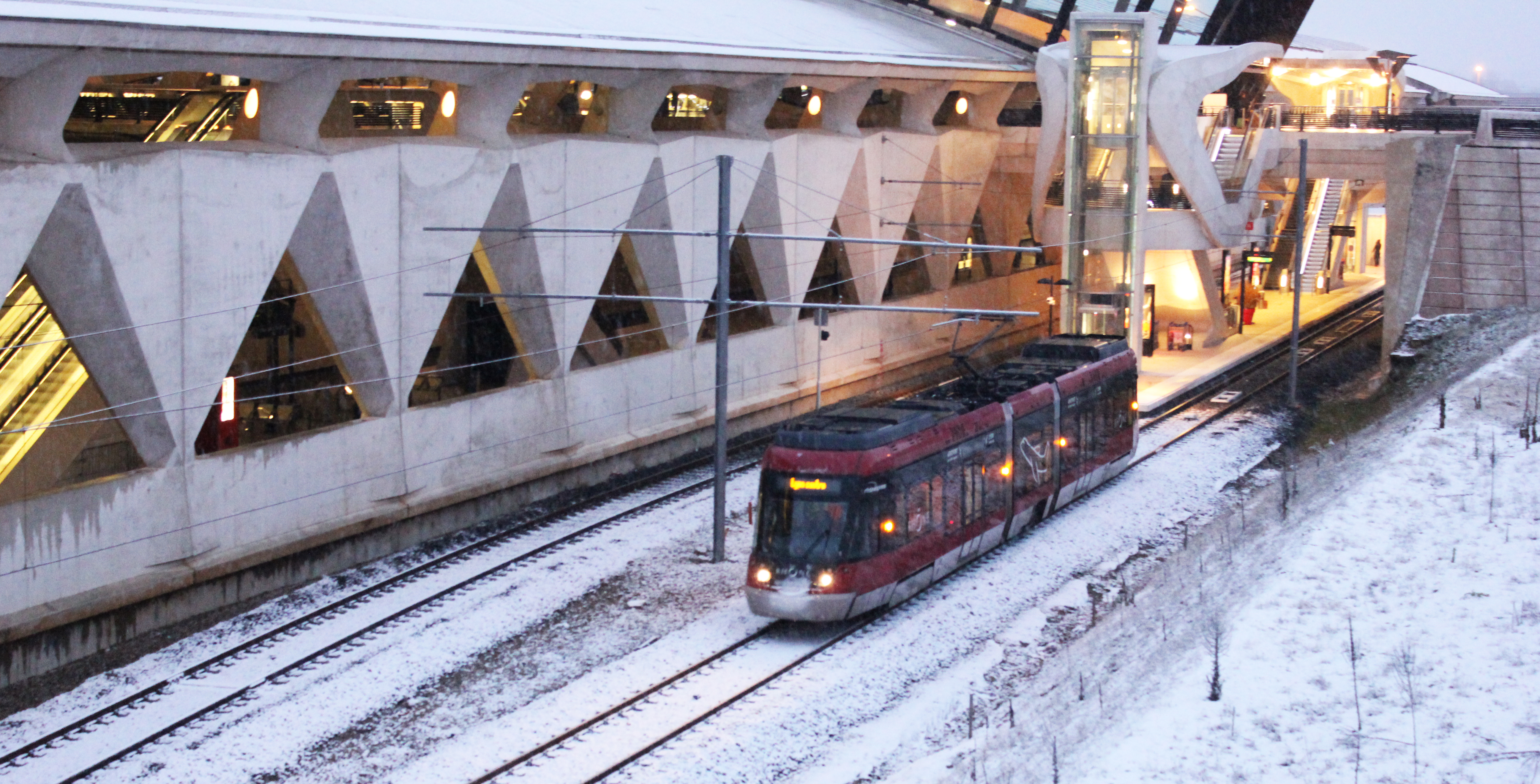 Rhônexpress au départ de la station "Aéroport Lyon - Saint Exupéry"